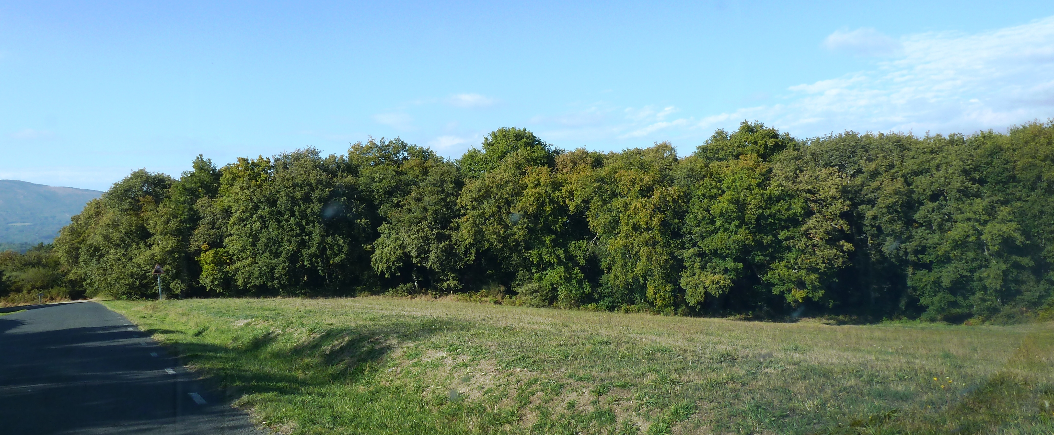 A Devesa do Rei, preto de Cartelos, Carballedo